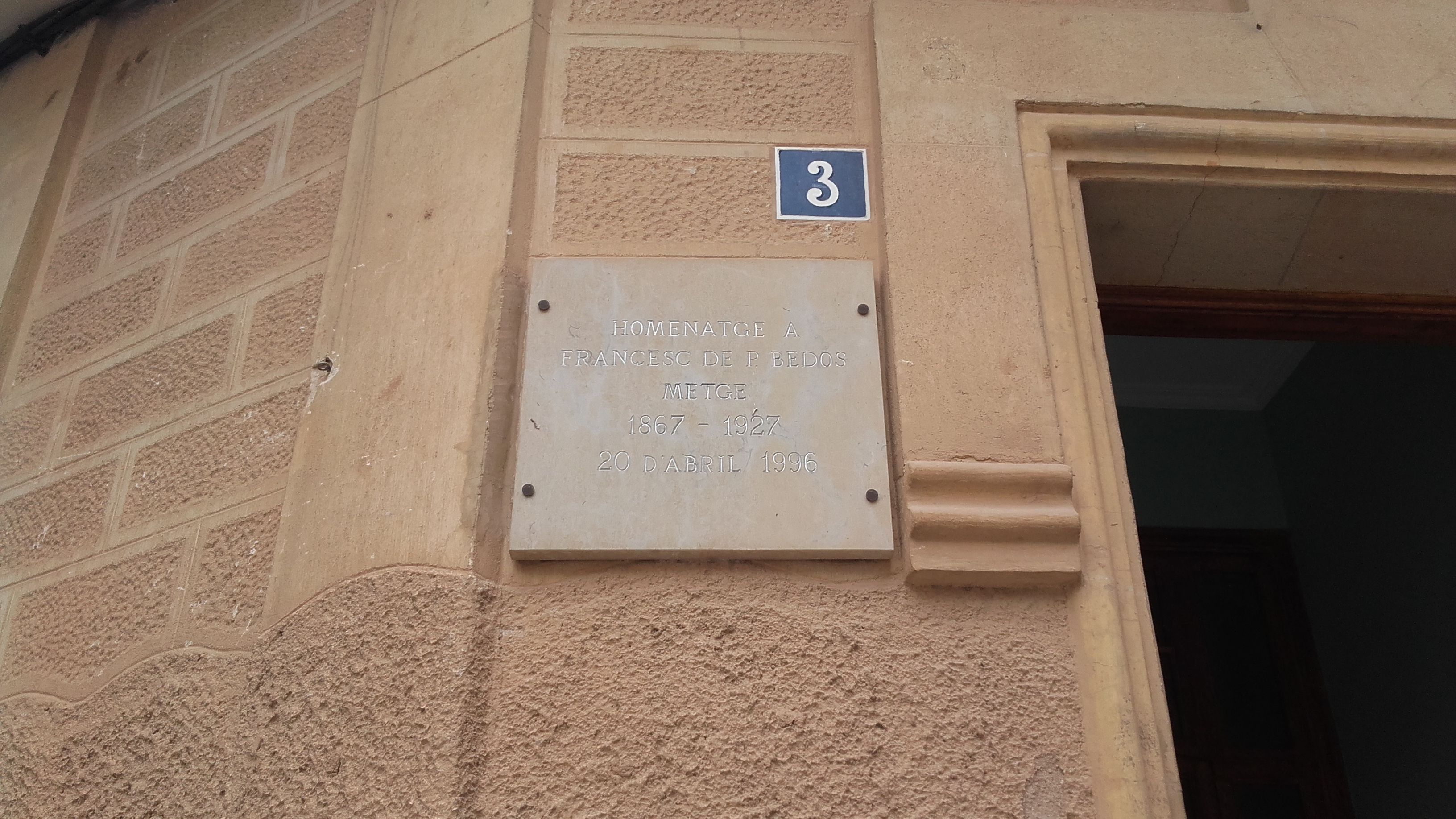 Placa d'homenatge al doctor Francesc de Paula Bedós, de l'any 1996, al Pont d'Armentera.